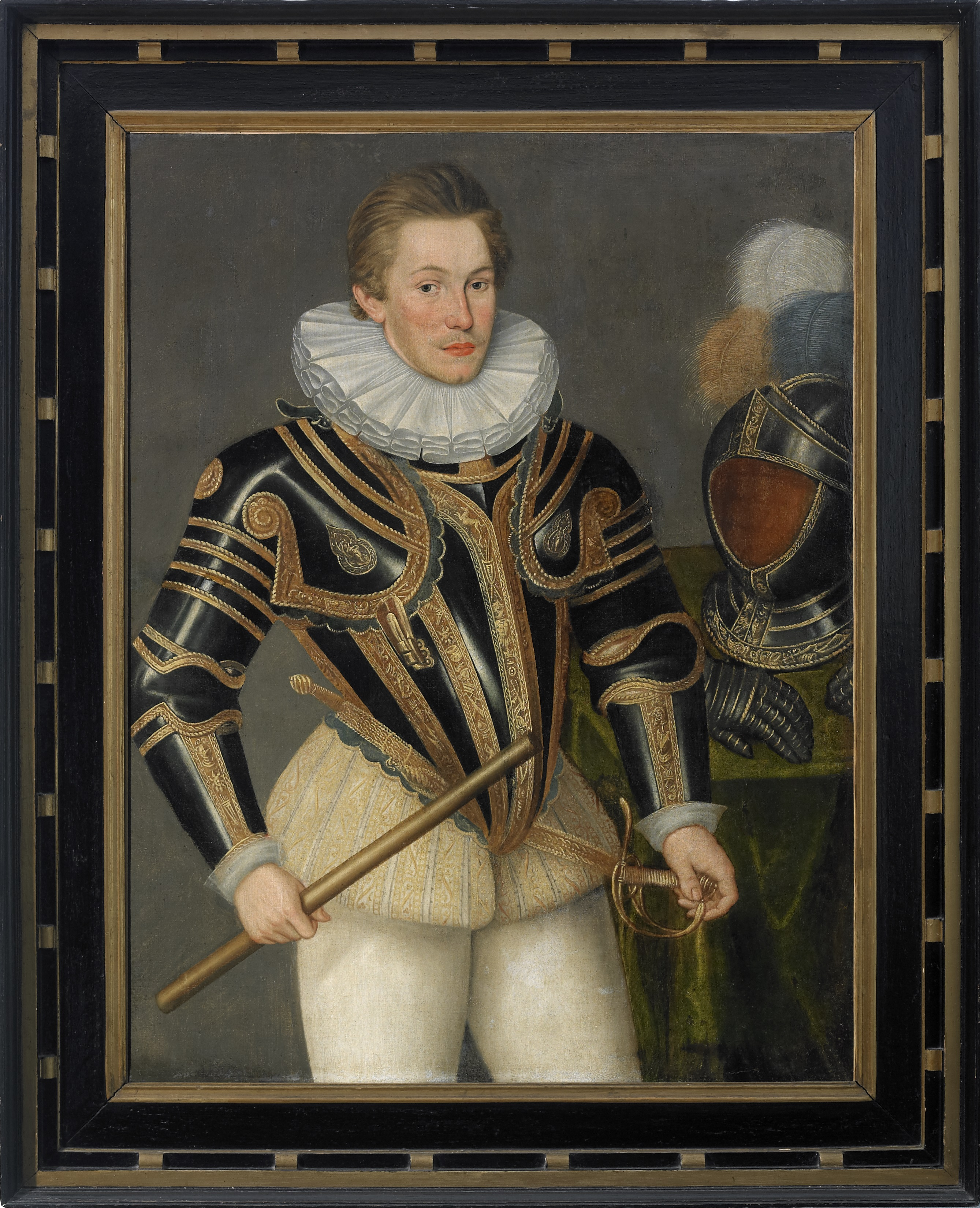 Portret van prins Maurits. Ter aankleding van het nieuwe stadhuis van Arnemuiden werd dit schilderij in 1588 besteld.